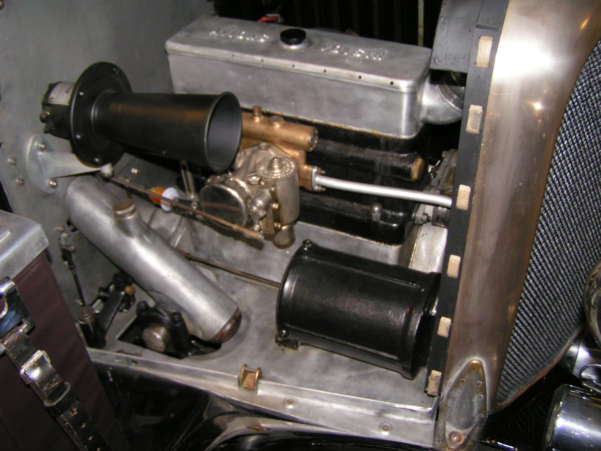 1927 Voisin C7 Avions Sleeve-valve engine.1927 Voisin C7 Avions